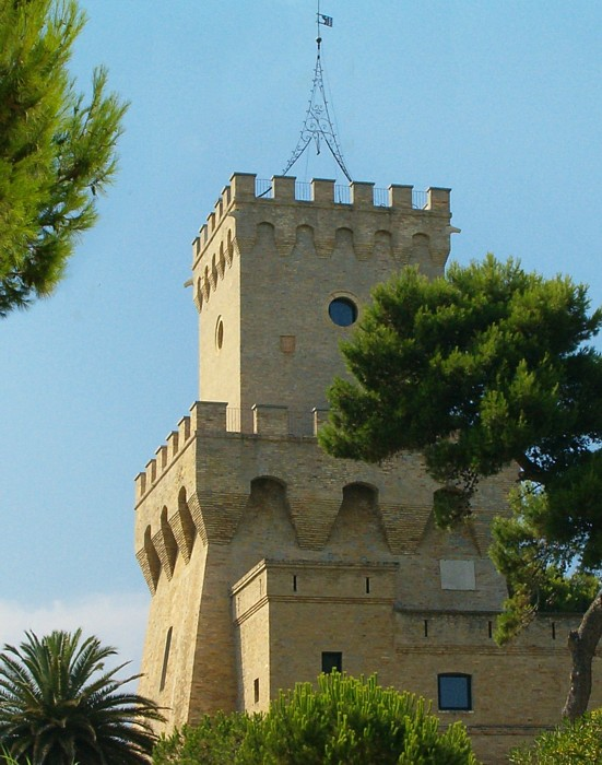 Toren van Pineto.